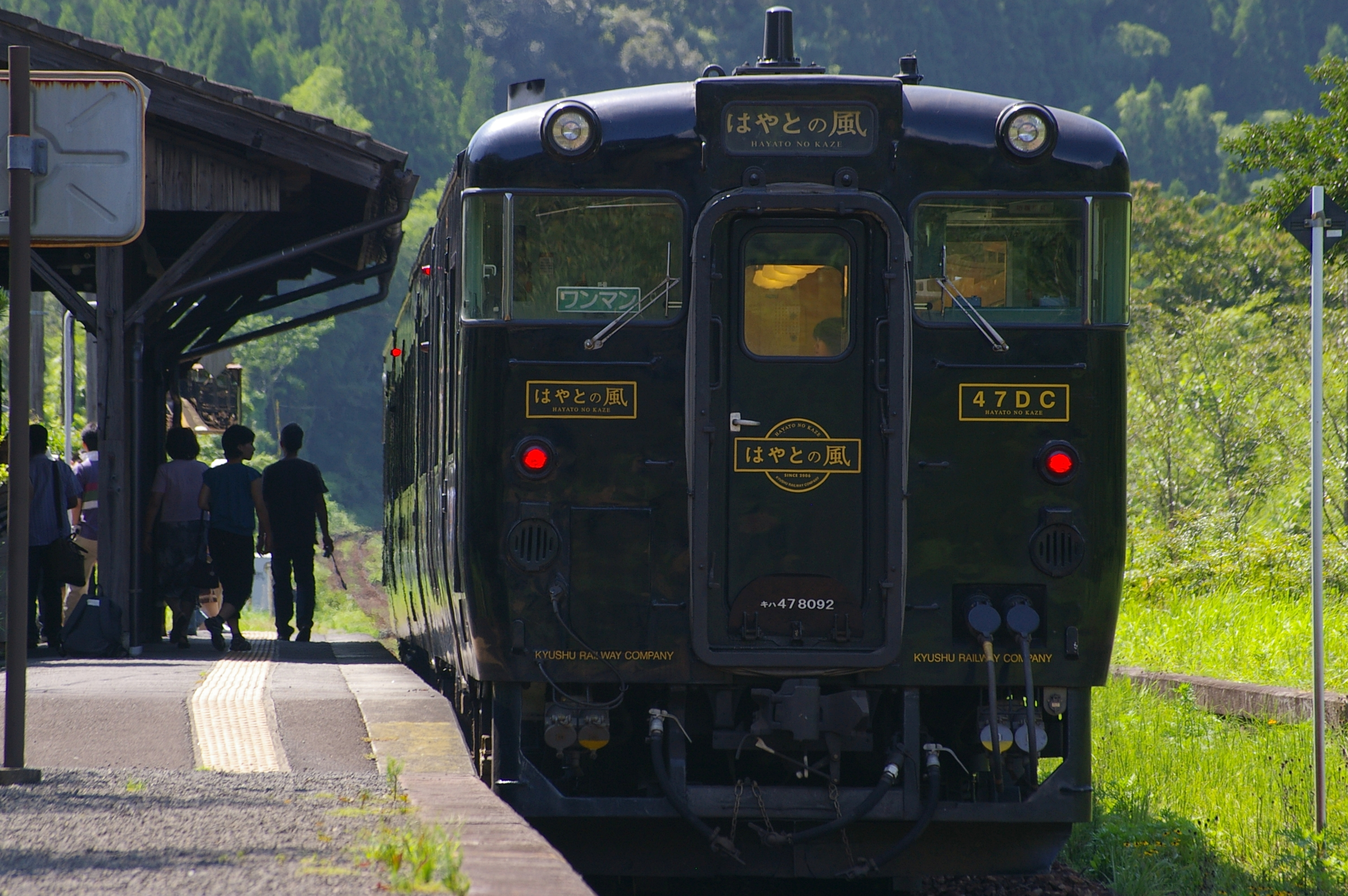 JR-Kyushu ,"Hayato no Kaze" express